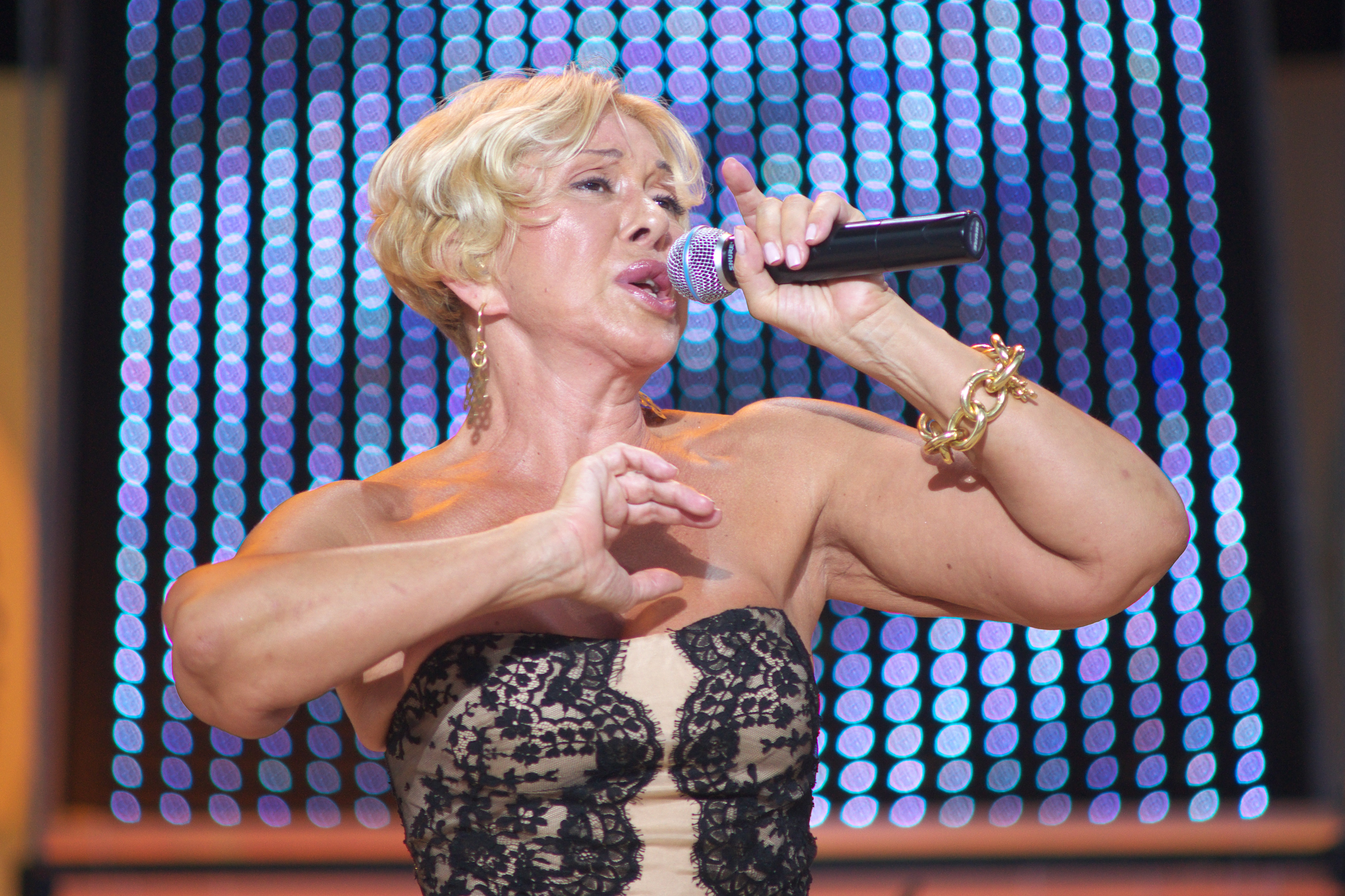 Любовь Успенская - российская и американская певица, исполнительница городского романса.